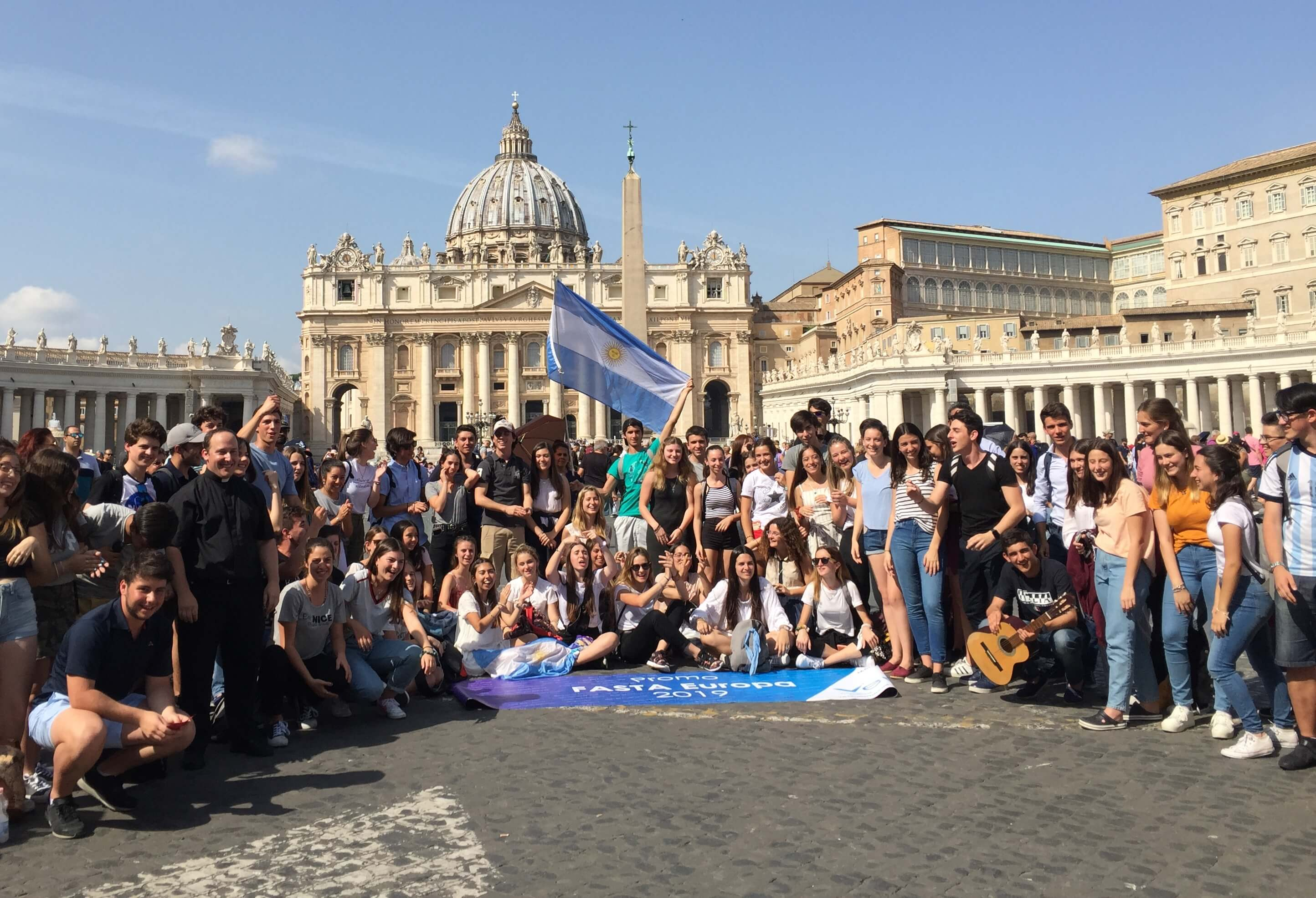 Grupo de estudiantes en la audiencia Papal en el Vaticano - Roma.